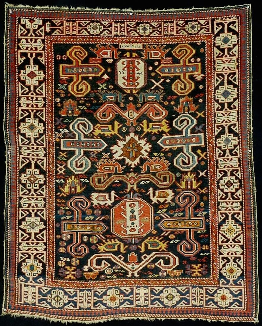 Азербайджанский ковёр "Пирабадил" датированный 1325 Хиджры (1907 по григорианскому календарю)